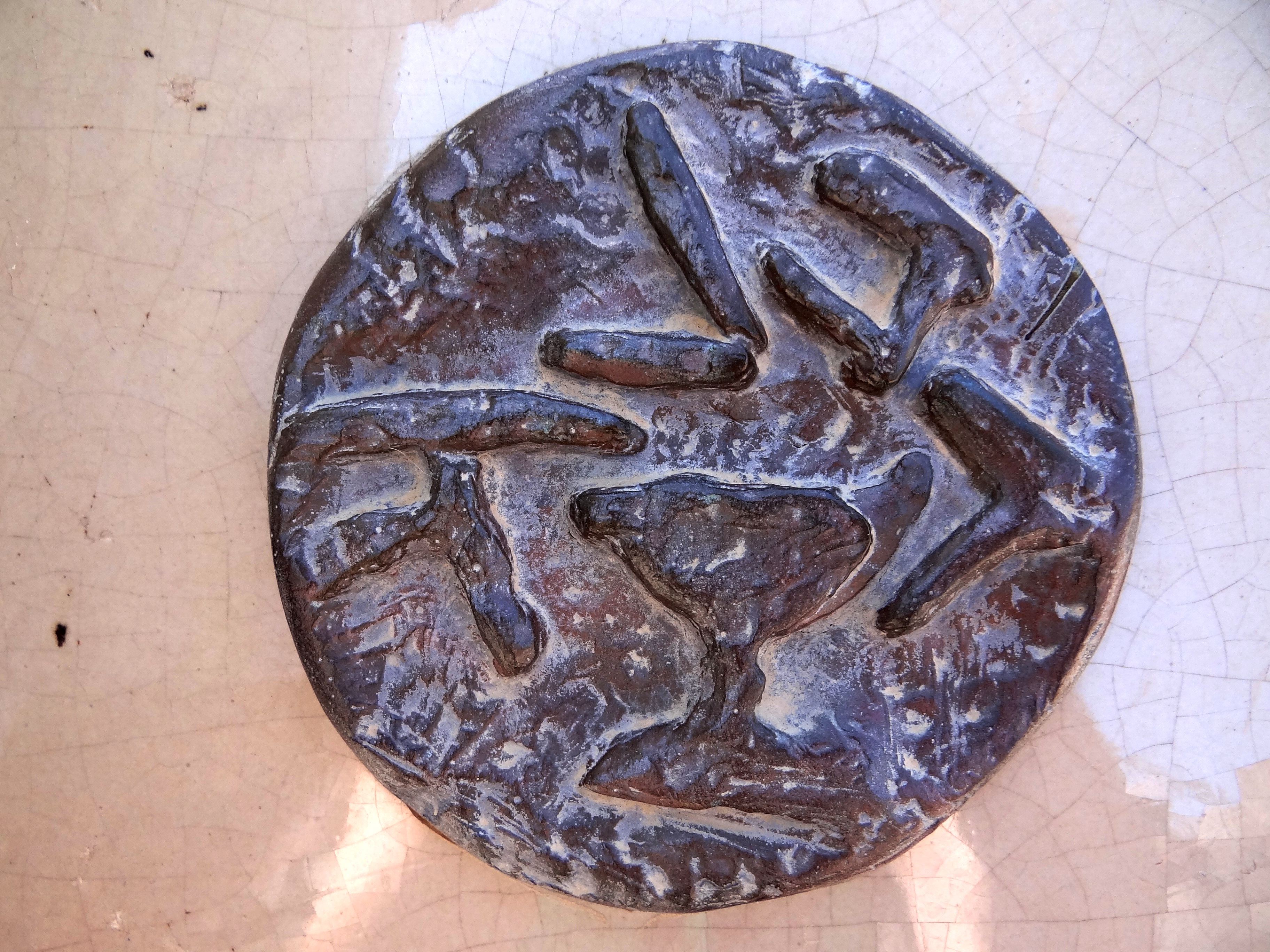 Gamla archaeology site אתר ארכאולוגי גמלא ברמת הגולן דגם מטבע המרד בגמלא